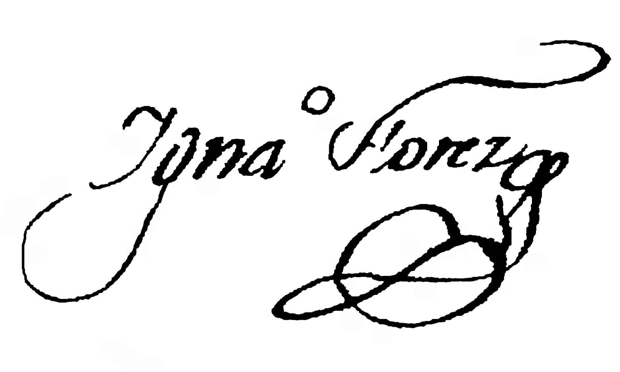 firma de Ignacio Flores